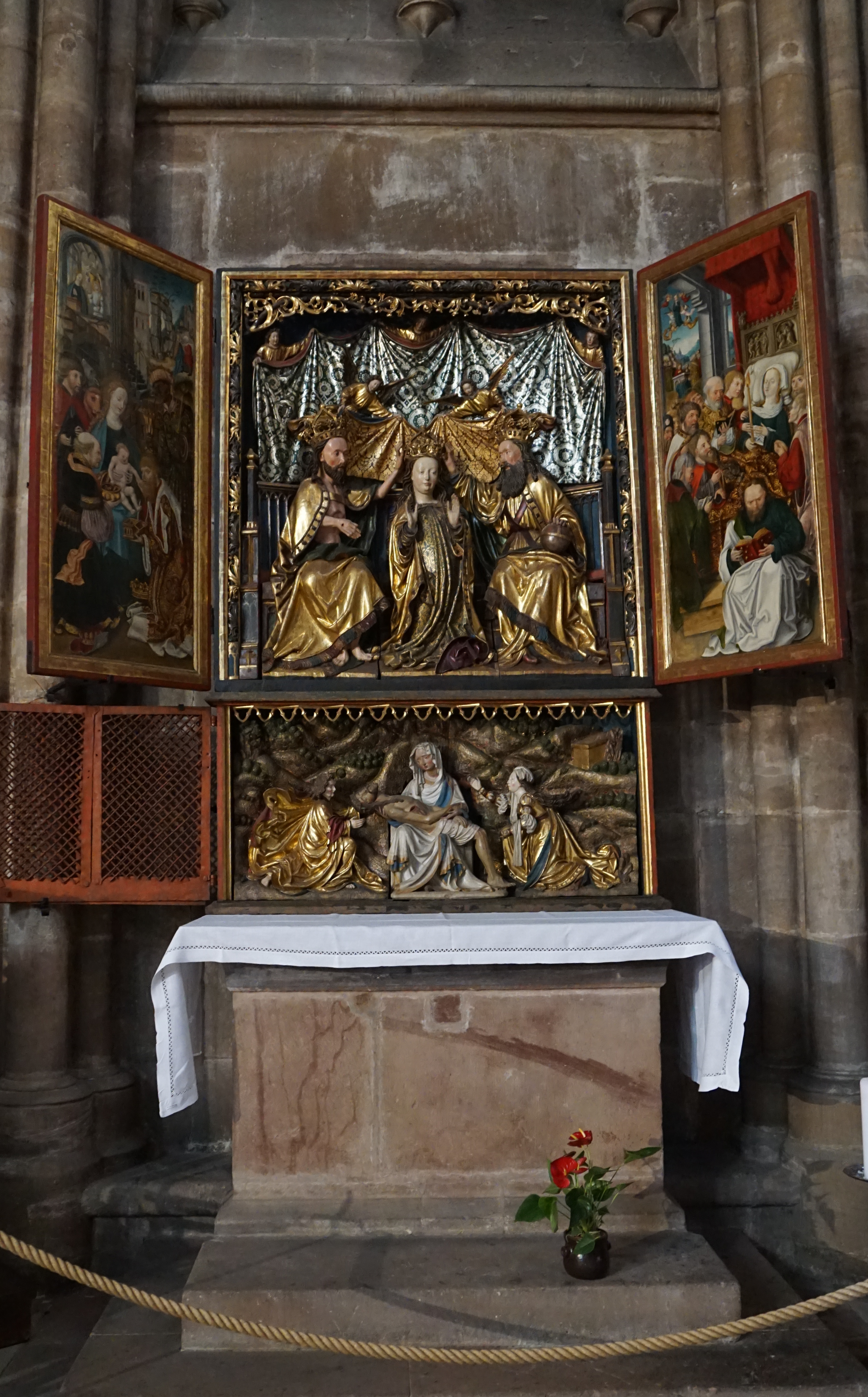 Siehe Dateiname; siehe auch